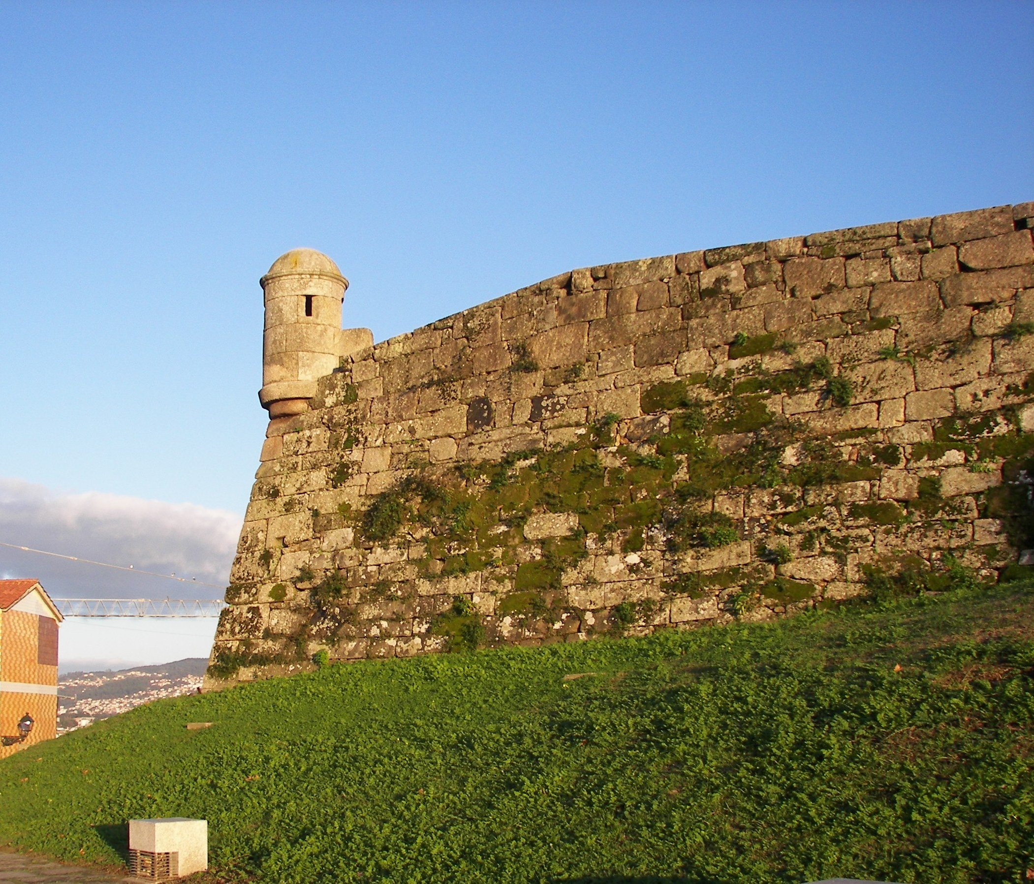 Ruinas del Castillo de San SebastianGalego: Ruínas do Castelo de San Sebastián